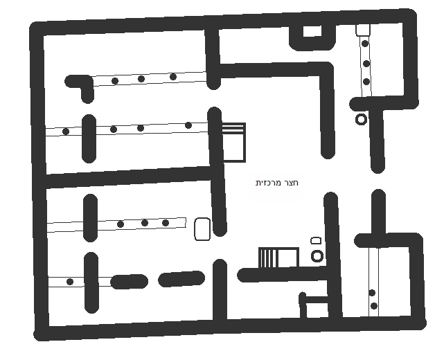 תכנית המבנה בורד יריחו, מהמאה ה-7 לפנה"ס